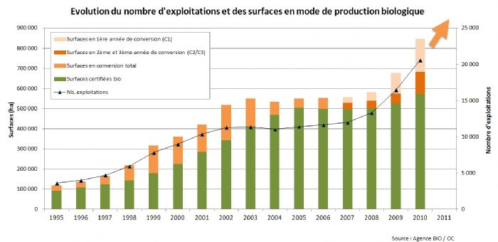 Evolution du nombre d'exploitations et des surfaces en mode de production biologique en France.